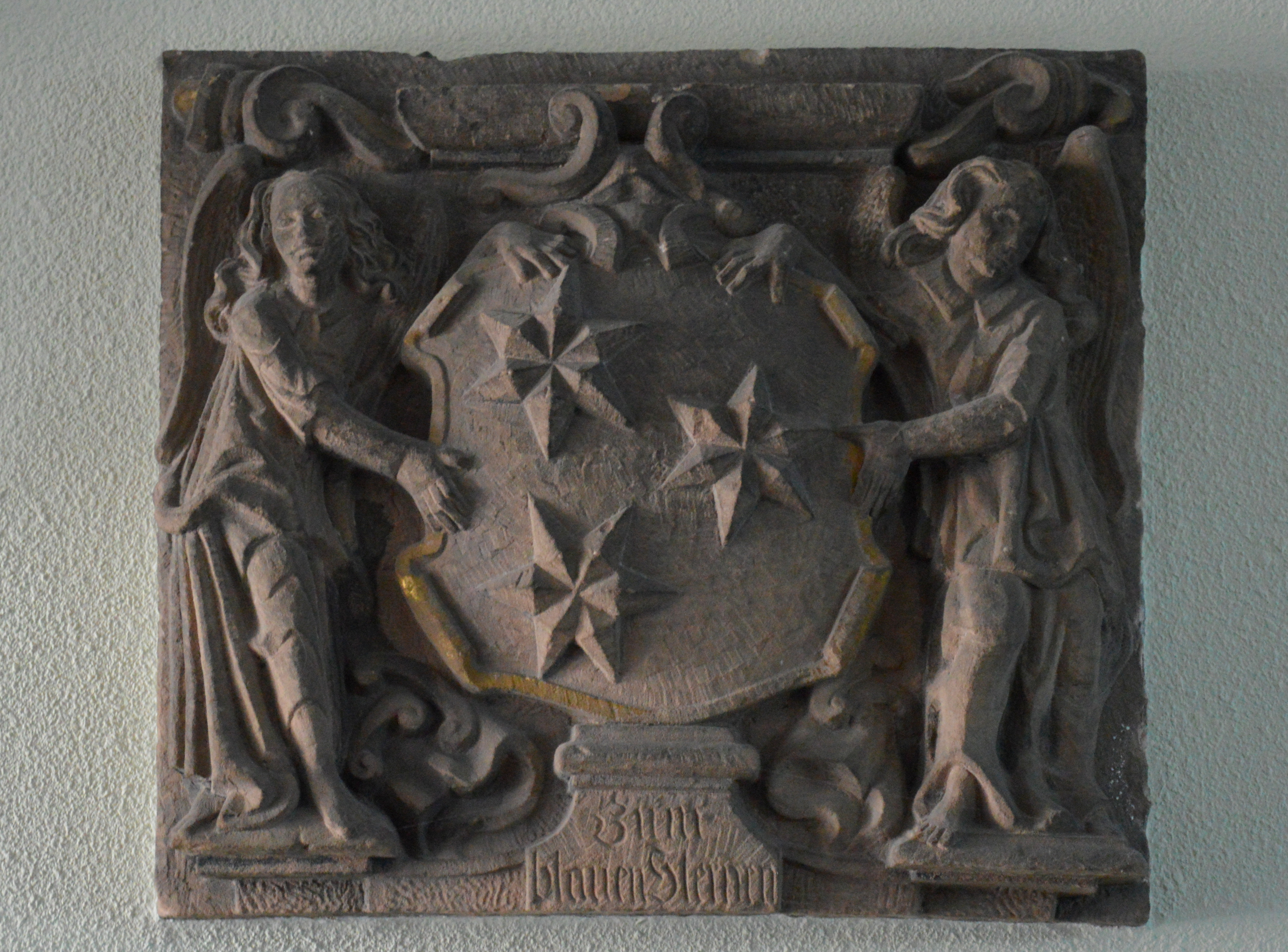 Alter Markt 12, 13 Hauszeichen Magdeburg